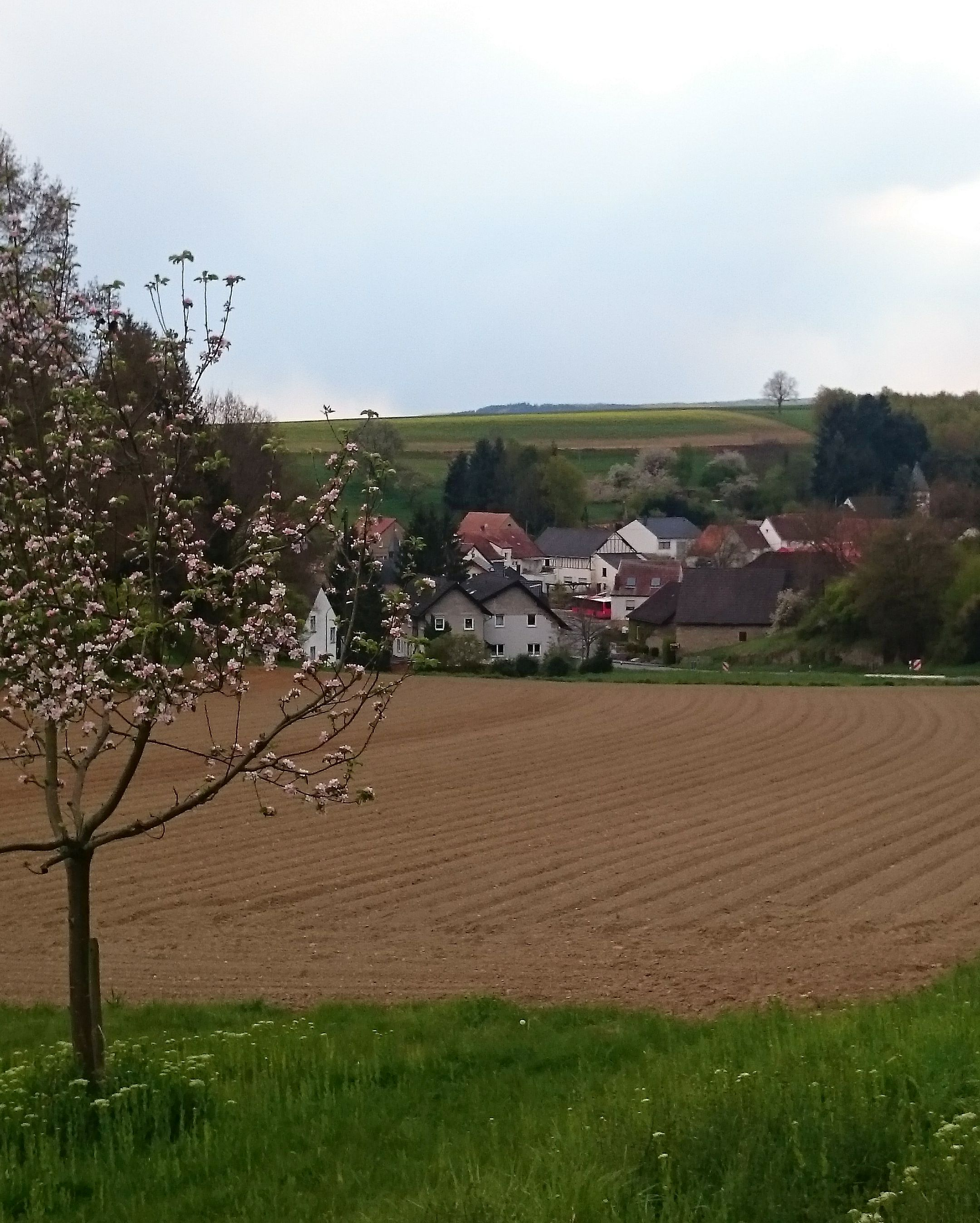 Oberstreit 2017